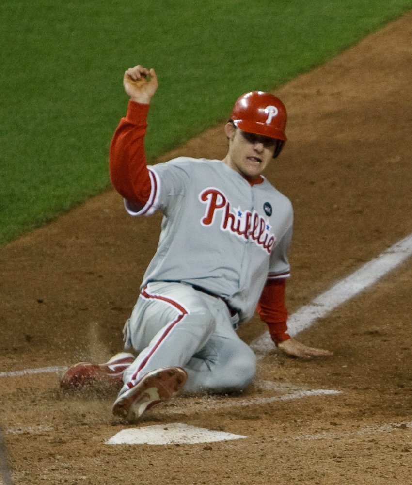 Lou Marson